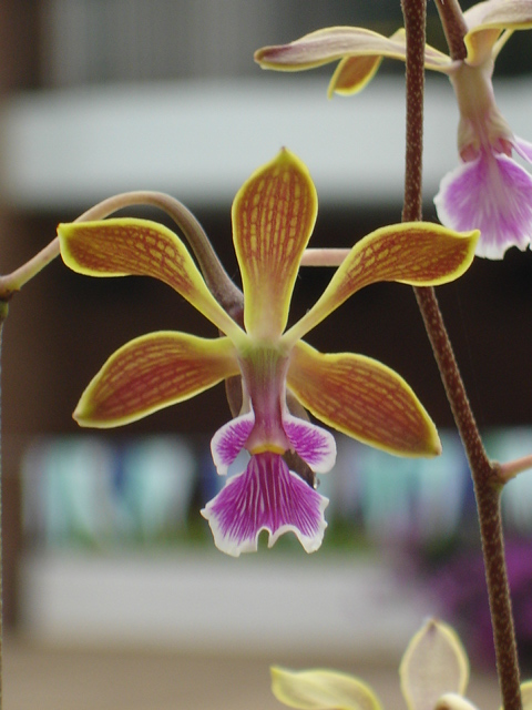 Encyclia oncidioides - flower. Orquidea cultivada: Club HAto grande (Bogota)